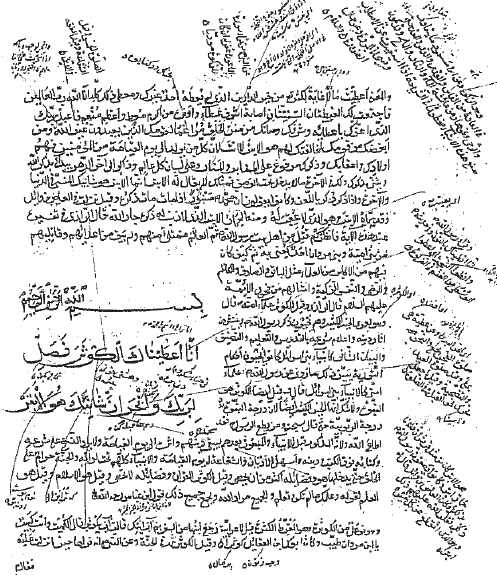 ترجمه مازندرانی سوره کوثر در کتب تاریخی